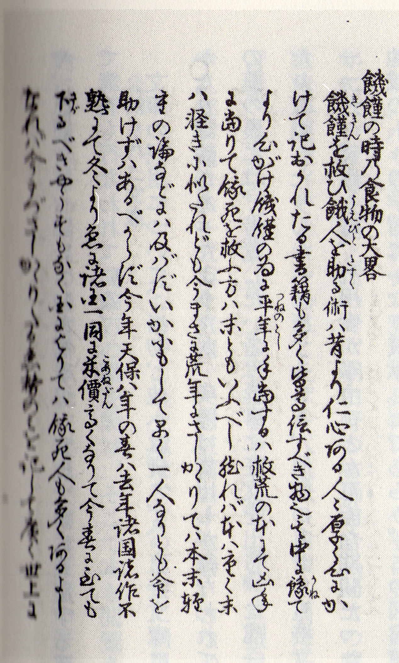 羽田八幡宮文庫『きゝんのこゝろえ』本文（万延元年、1860年）